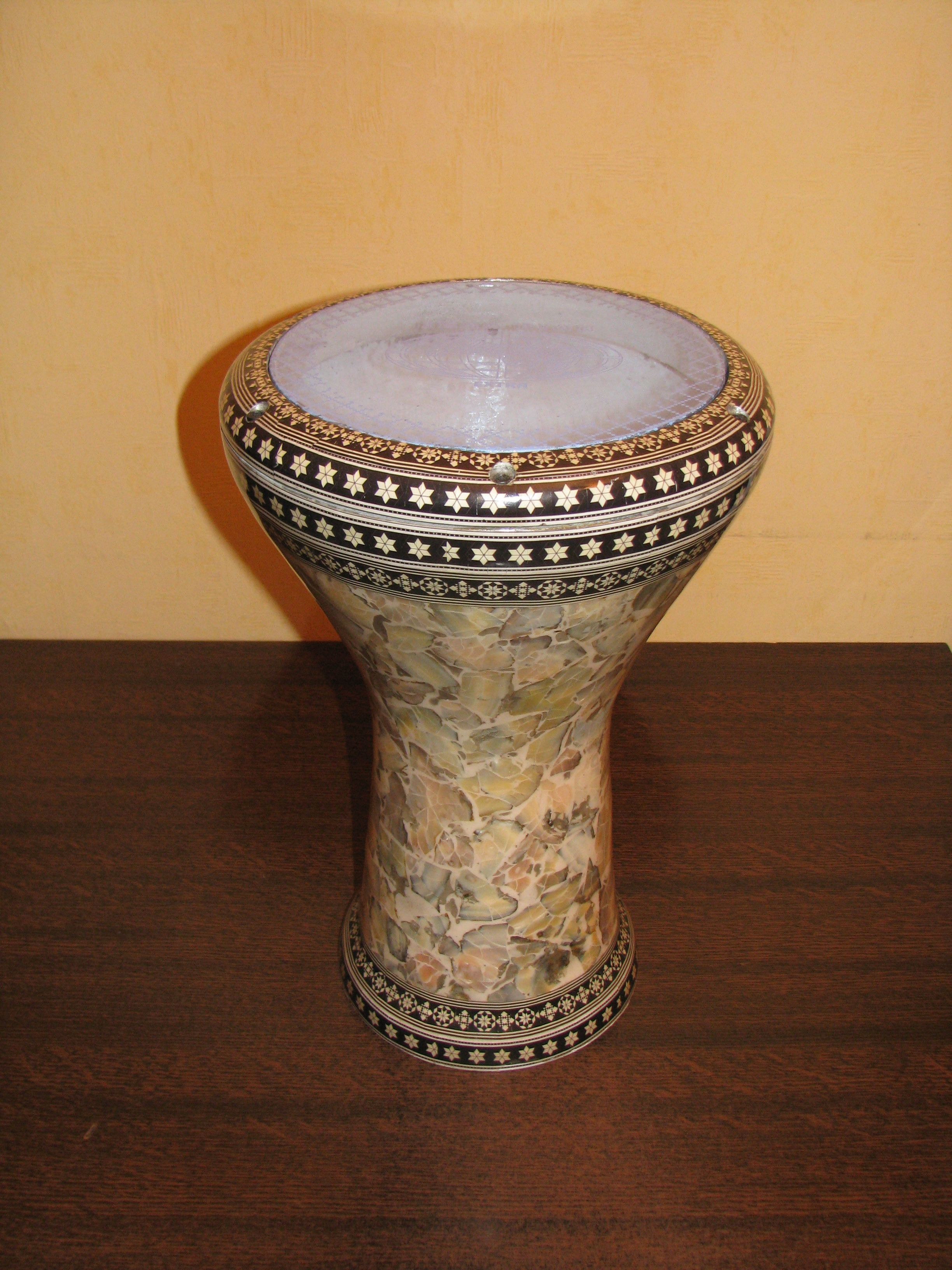 Darbouka égyptienne